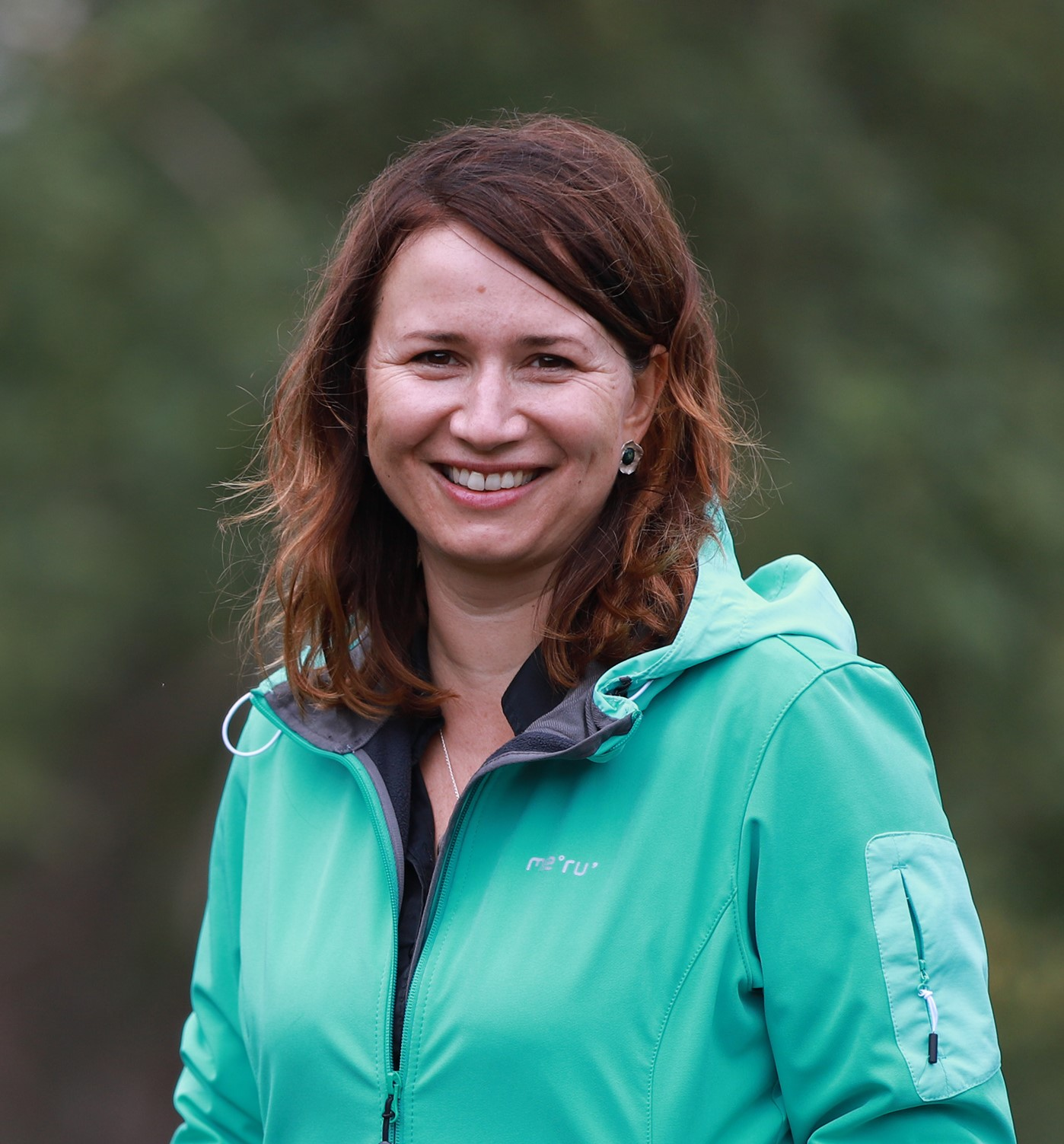 Anja Siegesmund